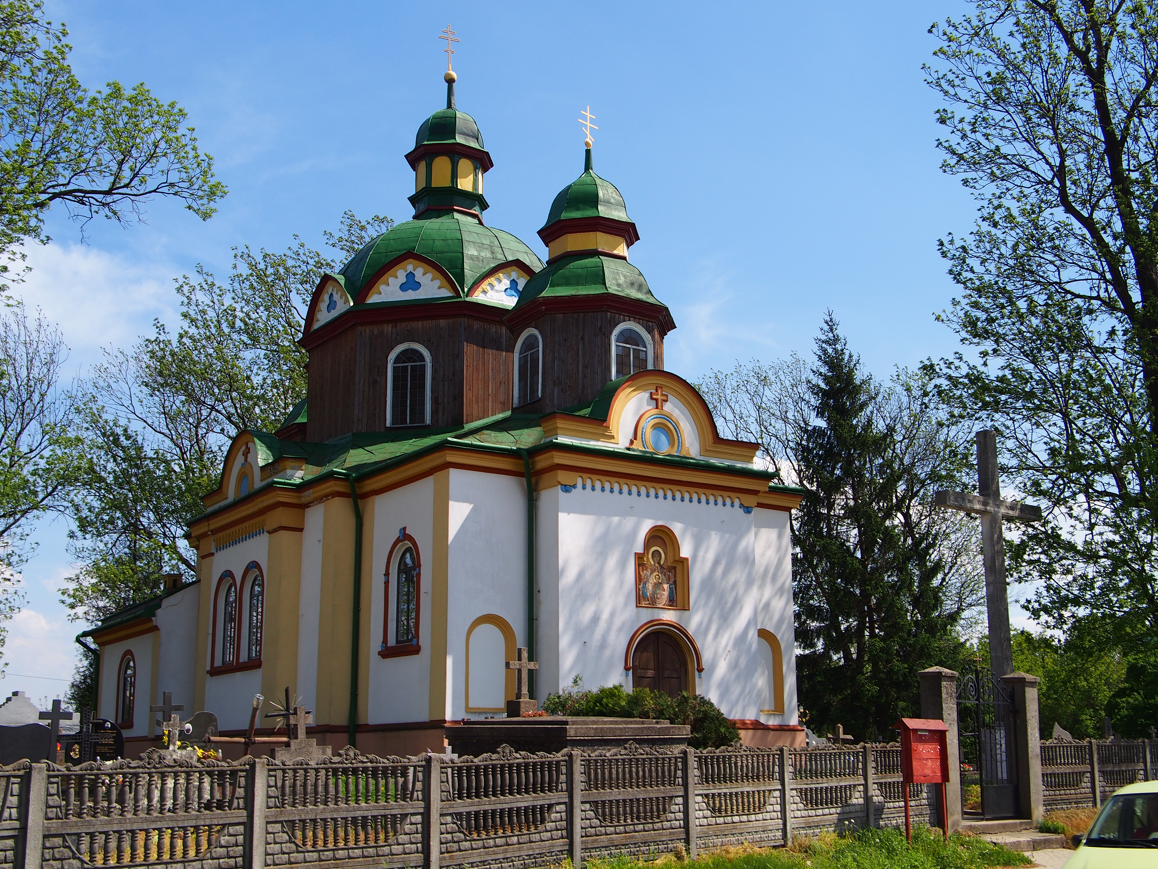 Przemyśl, Cerkiew pw. Zaśnięcia NMP